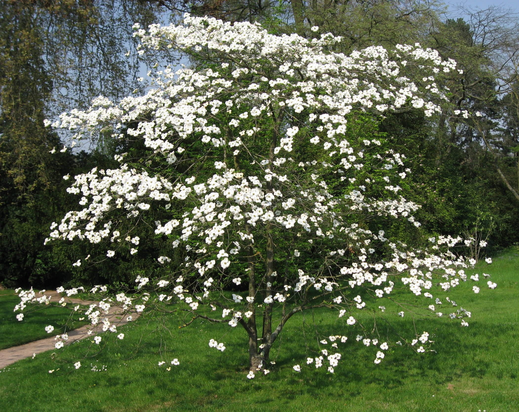 Cornus florida L. (Cornouiller blanc) in Arboretum de la Vallée-aux-Loups Map: 48° 46' 22" N 2° 16' 5" E